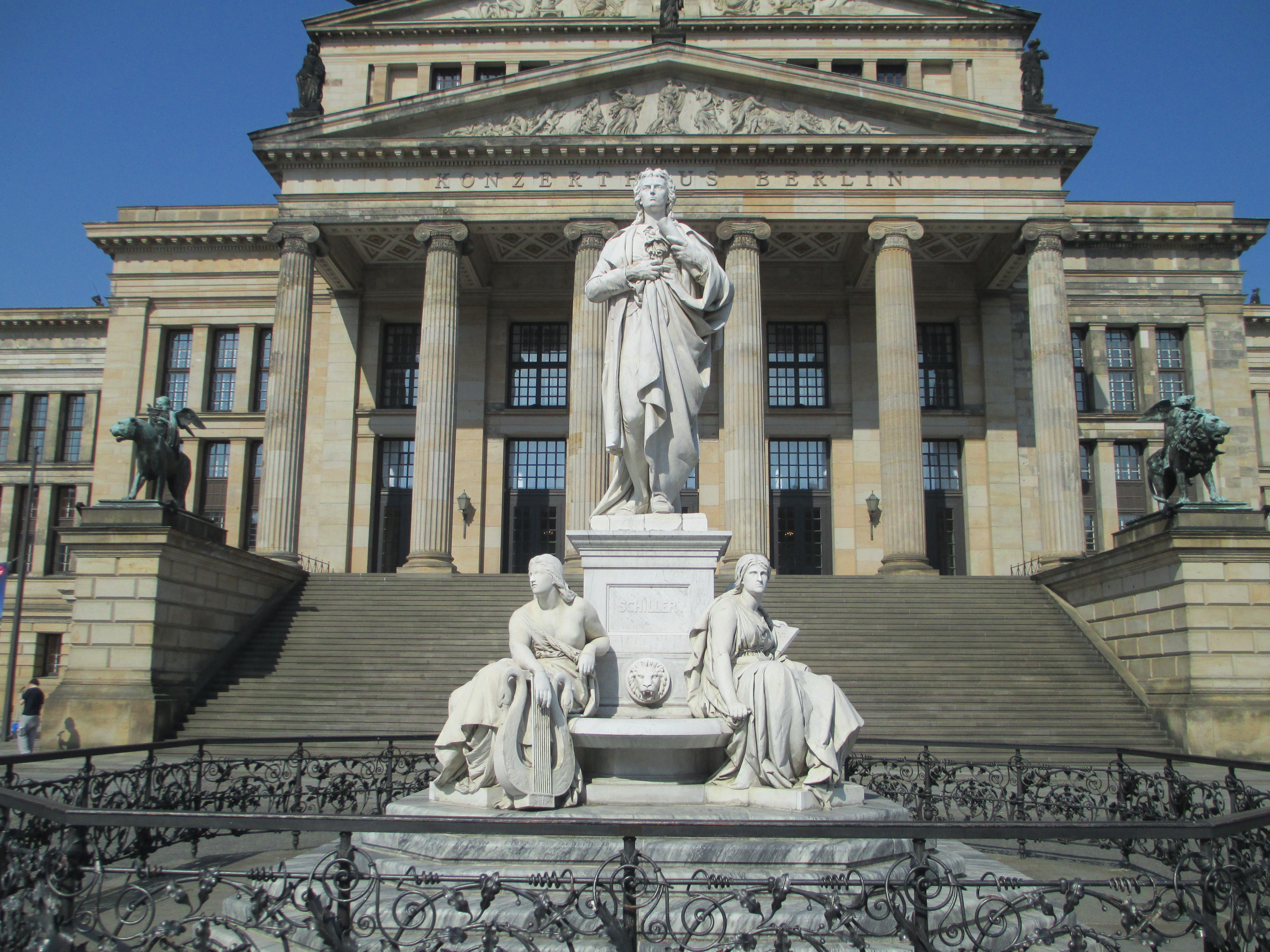 אנדרטת שילר בברלין